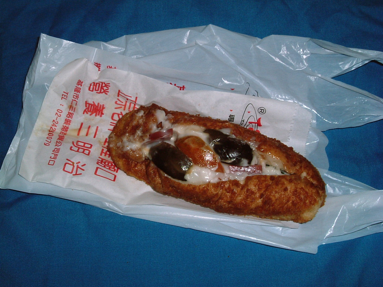 中文（台灣）: 基隆廟口夜市天盛鋪營養三明治賣出的營養三明治。這不是由吐司麵包所夾，而是由一個經過油炸後的圓形麵包所夾陷料而成。